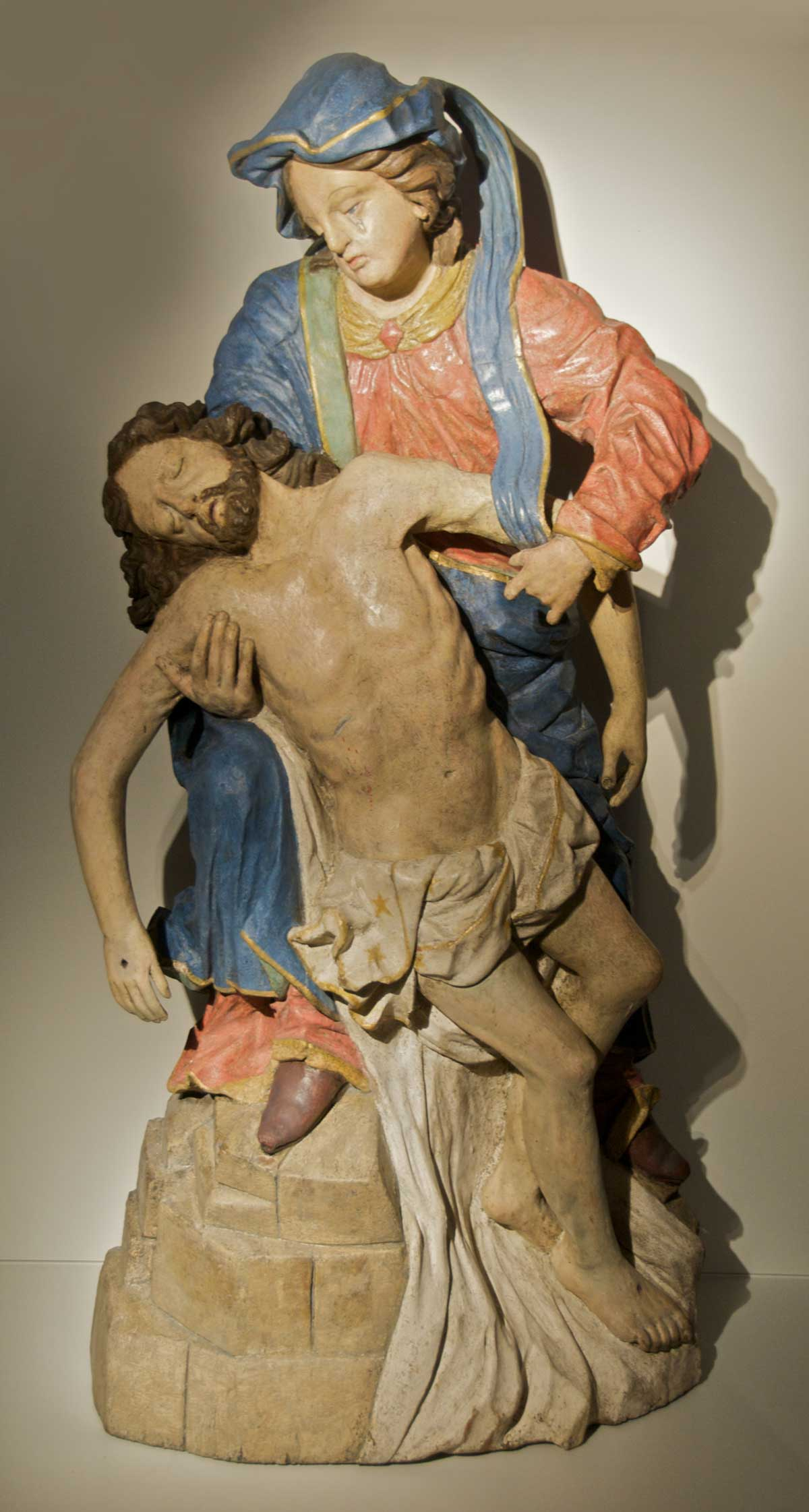 Sujet:Vertikal Pietà an der Waasserbëlleger Kierch Auteur: Eege Foto vum Benotzer:Cornischong